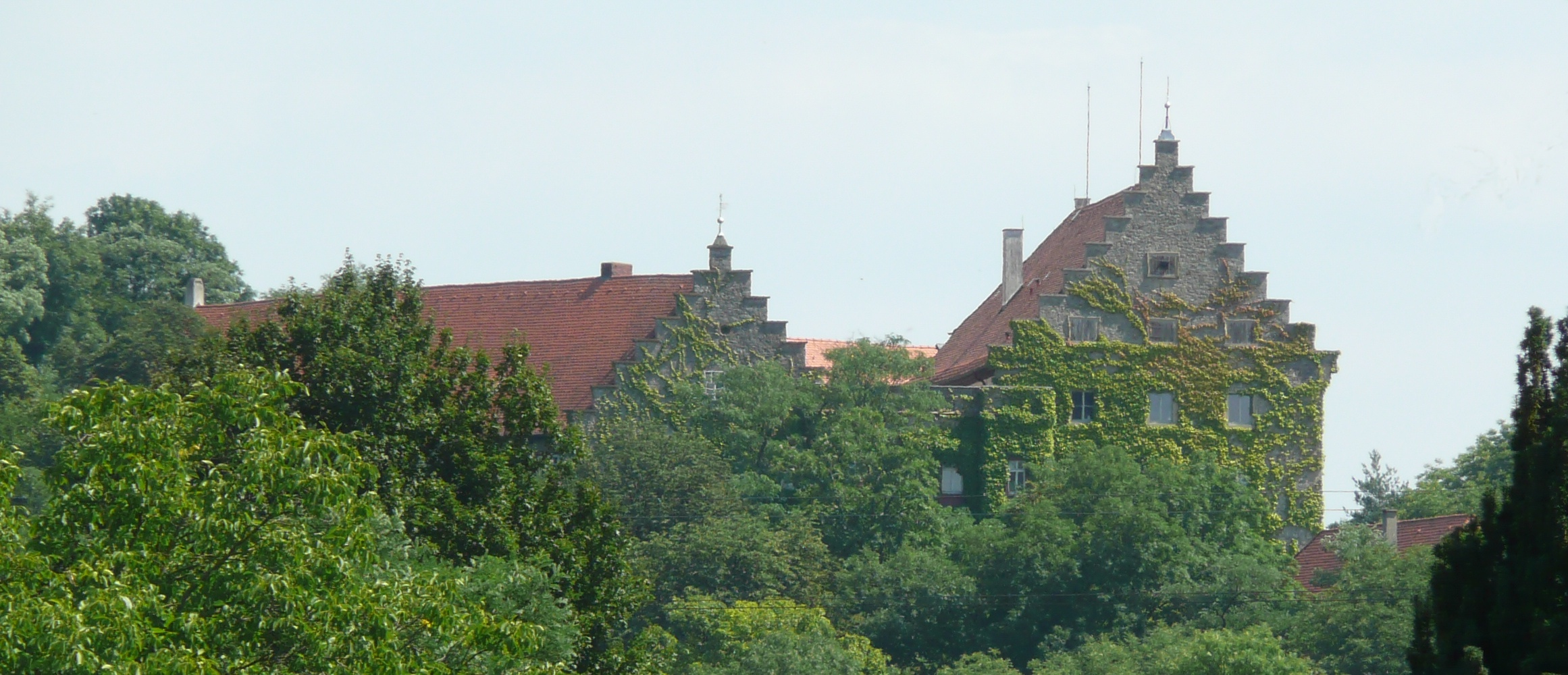 Schloss Reichenberg in Reichenberg, Unterfranken. Blick von Westen, aufgenommen aus der Gemeinde.